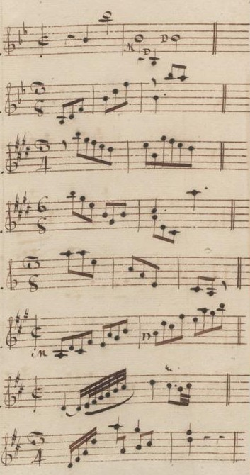 Table du volume XIII des manuscrits de Venise (incipit des sonates 15 à 22, K. 528 à 535).